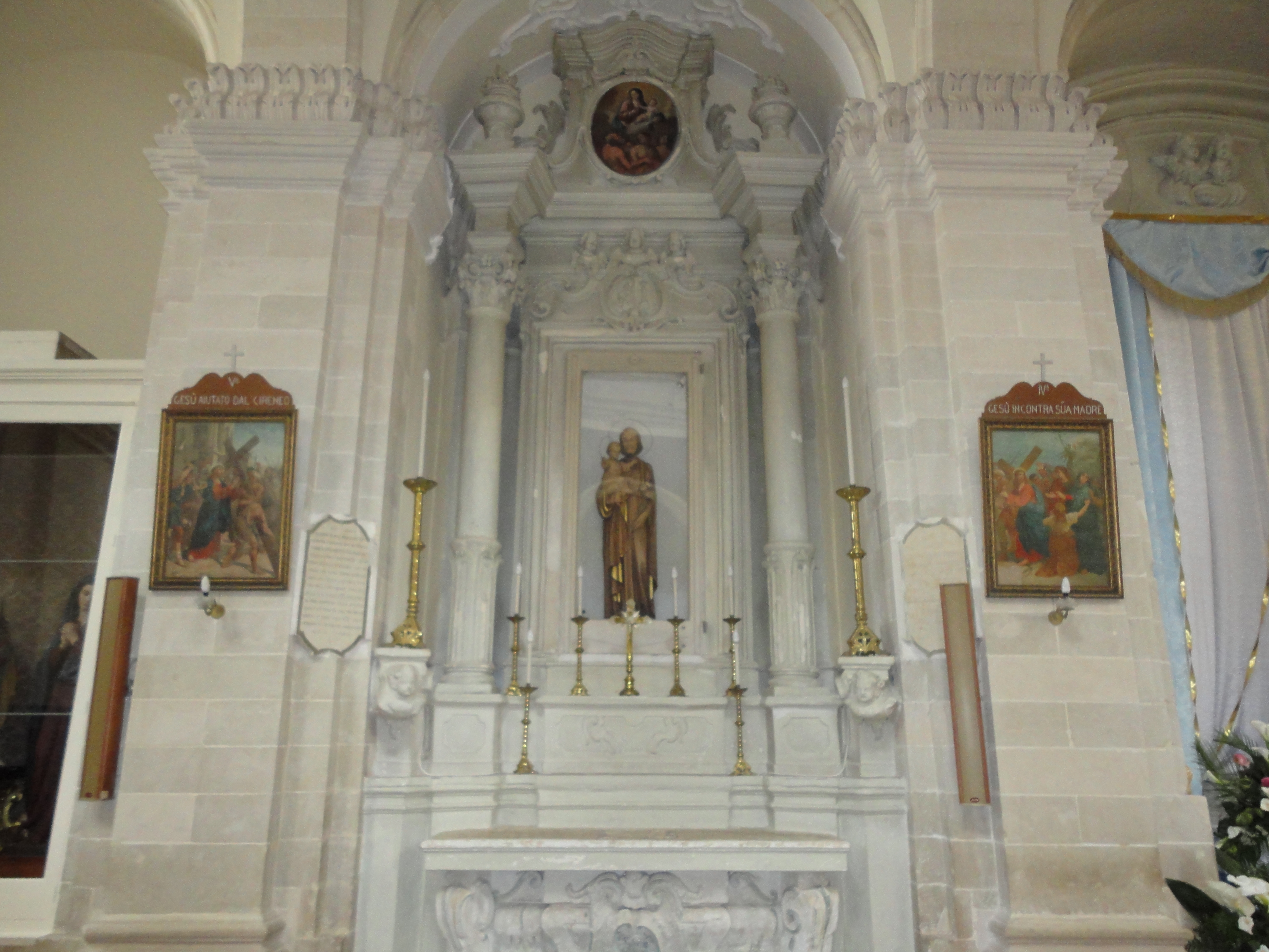 Chiesa di Uggiano la Chiesa San Giuseppe, Lecce